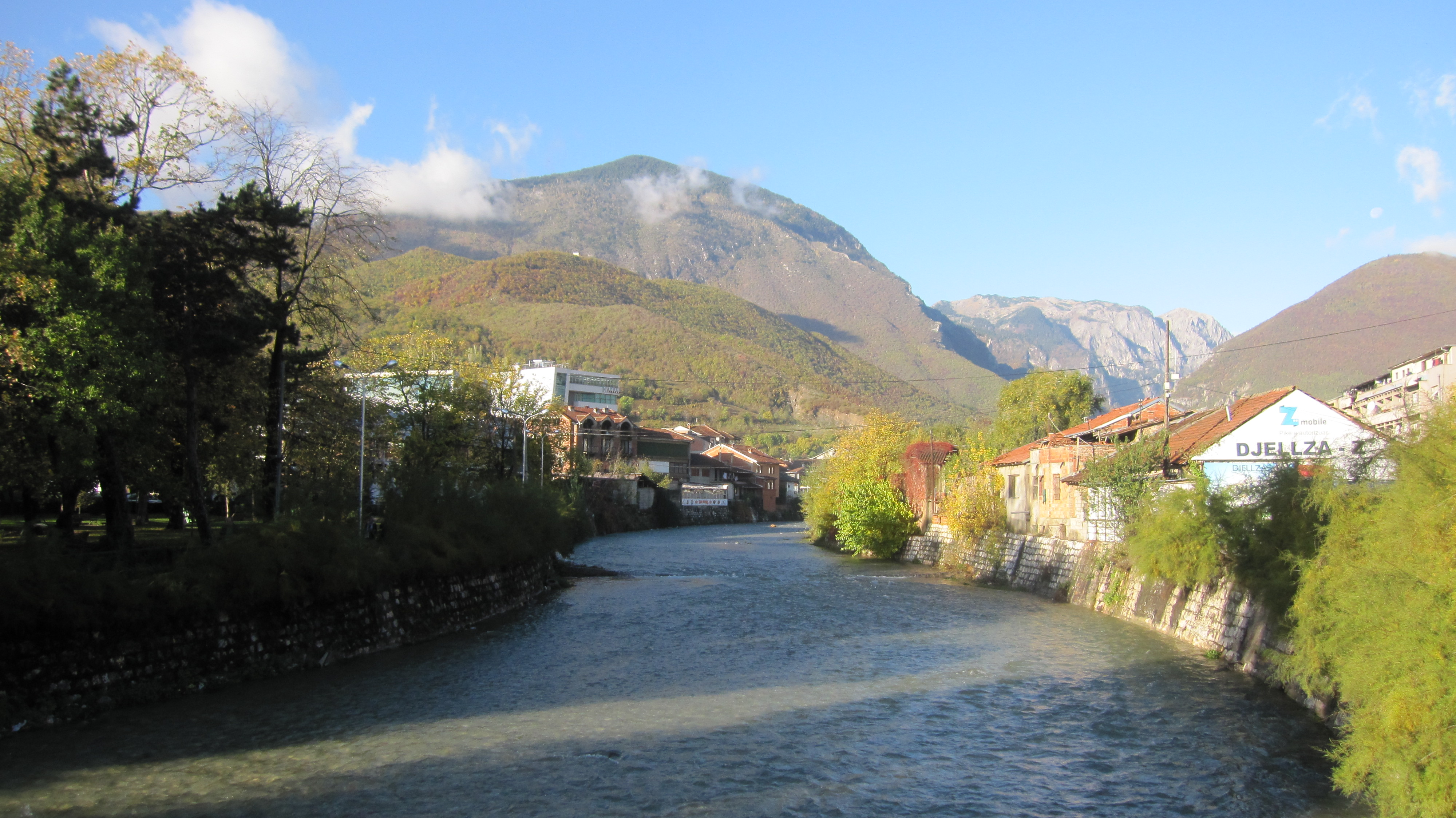 Lumbardhi i Pejes